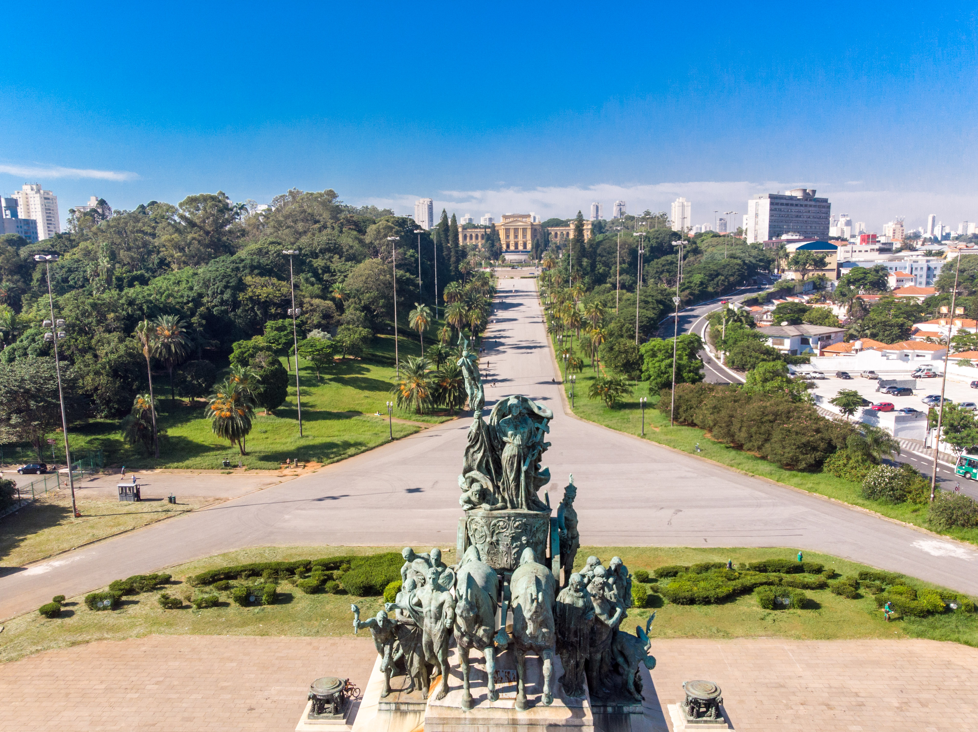 Imagens do Museu do Ipiranga. Local: São Paulo/SP Data: 26/03/2019 Foto: Governo do Estado de São Paulo